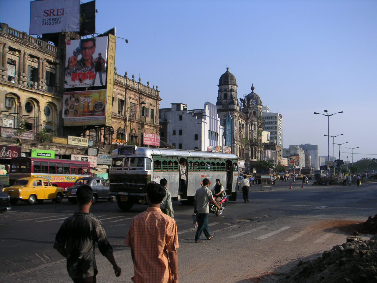 Kolkata. Photo: Soman